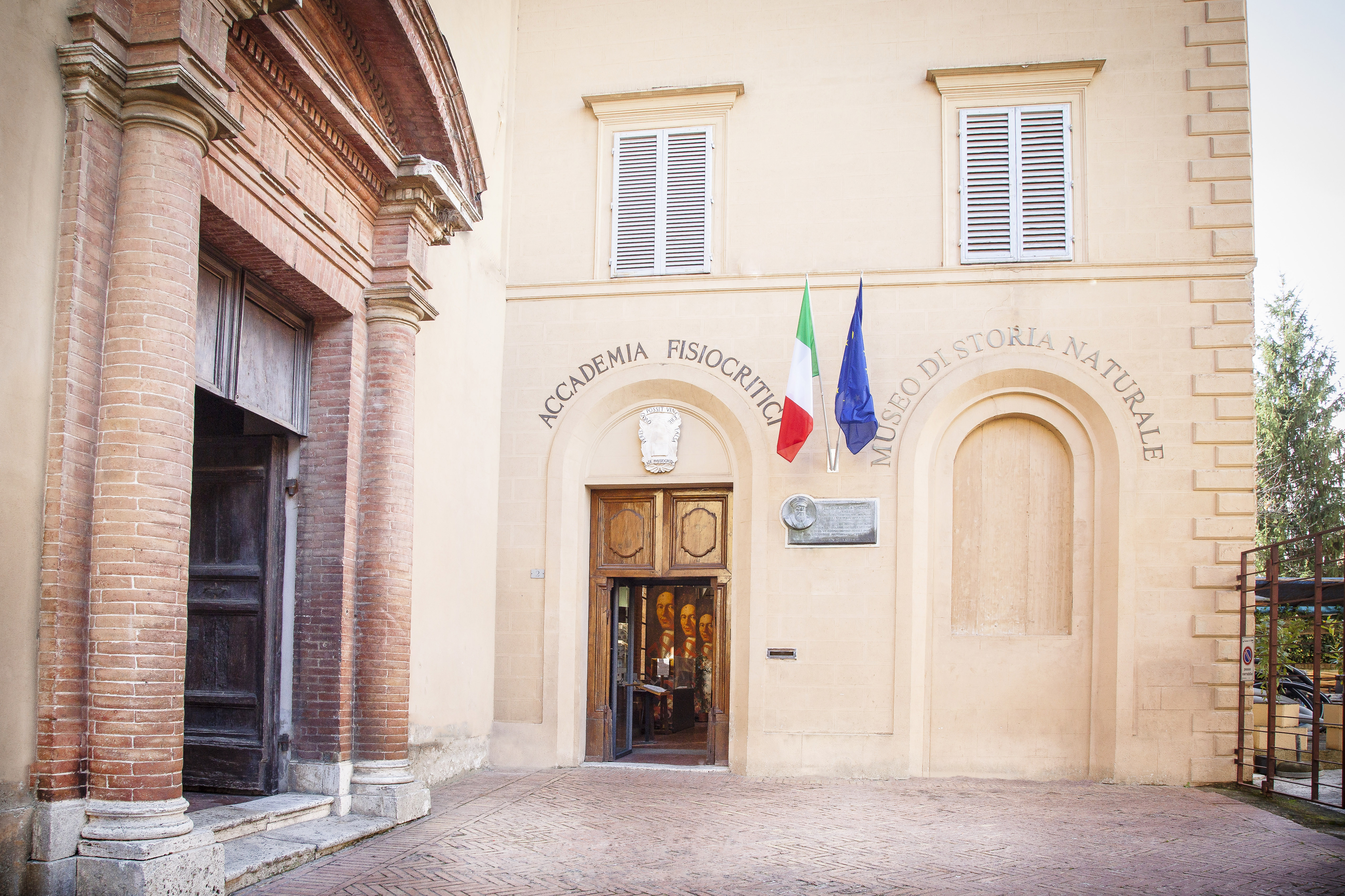 Ingresso Accademia dei Fisiocritici Piazzetta Silvio Gigli Siena